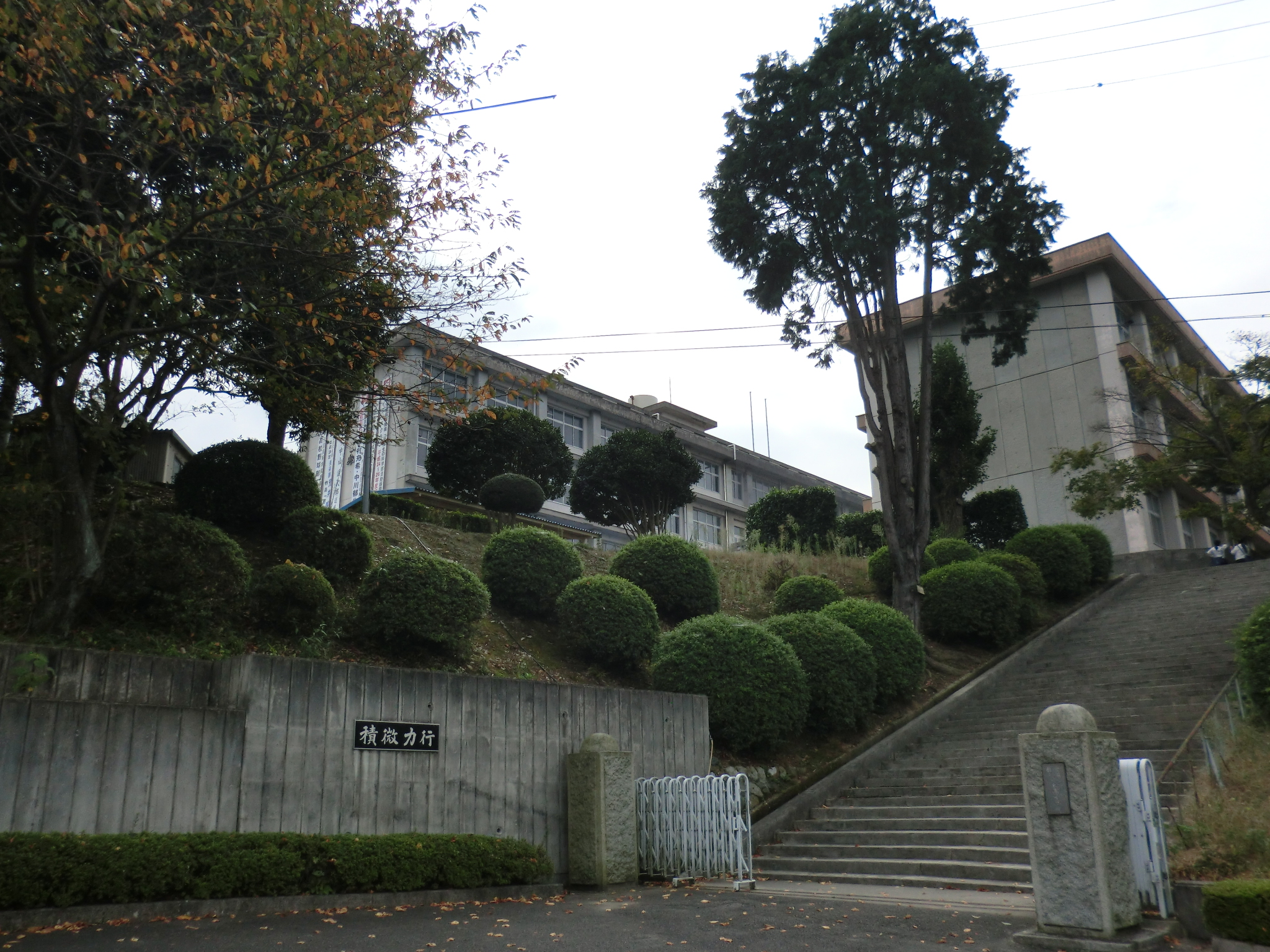 小松高校入り口